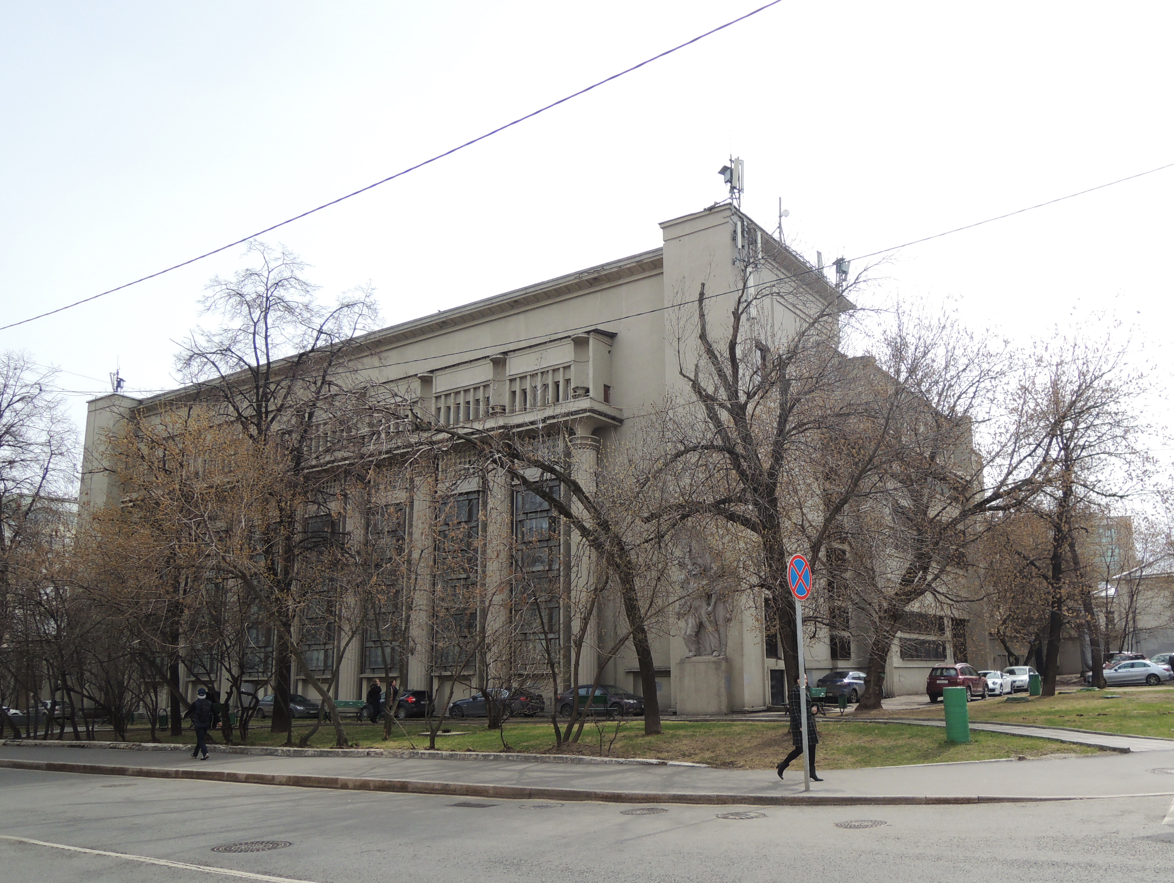 Большая Никитская улица. № 7/10 — первая подстанция московского метрополитена (1935, архитектор Даниил Фридман). Построена на месте упразднённого Никитского монастыря, по которому улица получила название